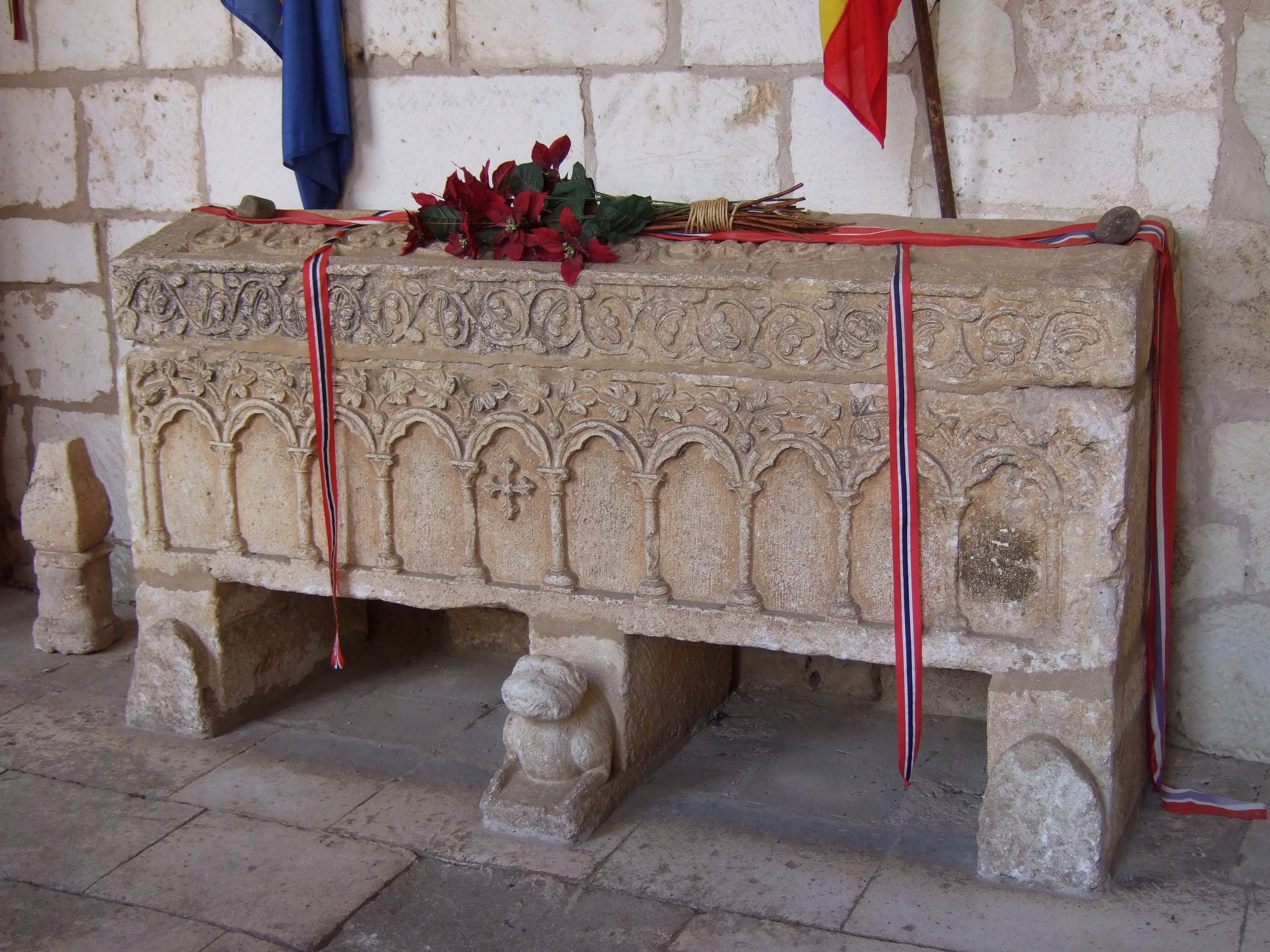 Sepulcro de la princesa Cristina de Noruega (1234-1262), que fue hija del rey Haakon IV de Noruega y esposa del infante Felipe de Castilla, hijo del rey Fernando III de Castilla. Se encuentra en el claustro de la Colegiata de Covarrubias, en la provincia de Burgos. (España).